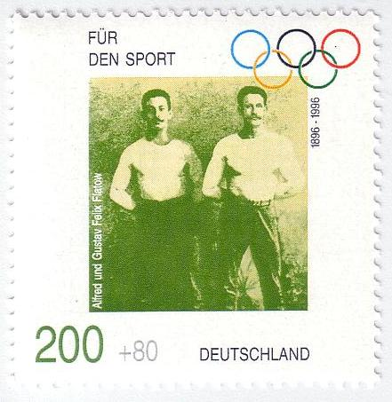 Briefmarke der Deutschen Post AG von 1995 (Michel-Nr.1864). Auflage:2.925.000